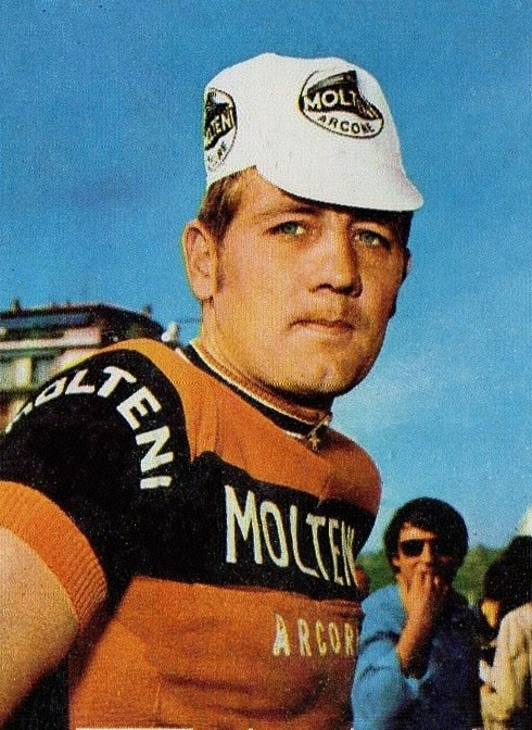 CAMPIONI dello SPORT 1973/74-Figurina n.160- SWERTS -CICLISMO-Rec